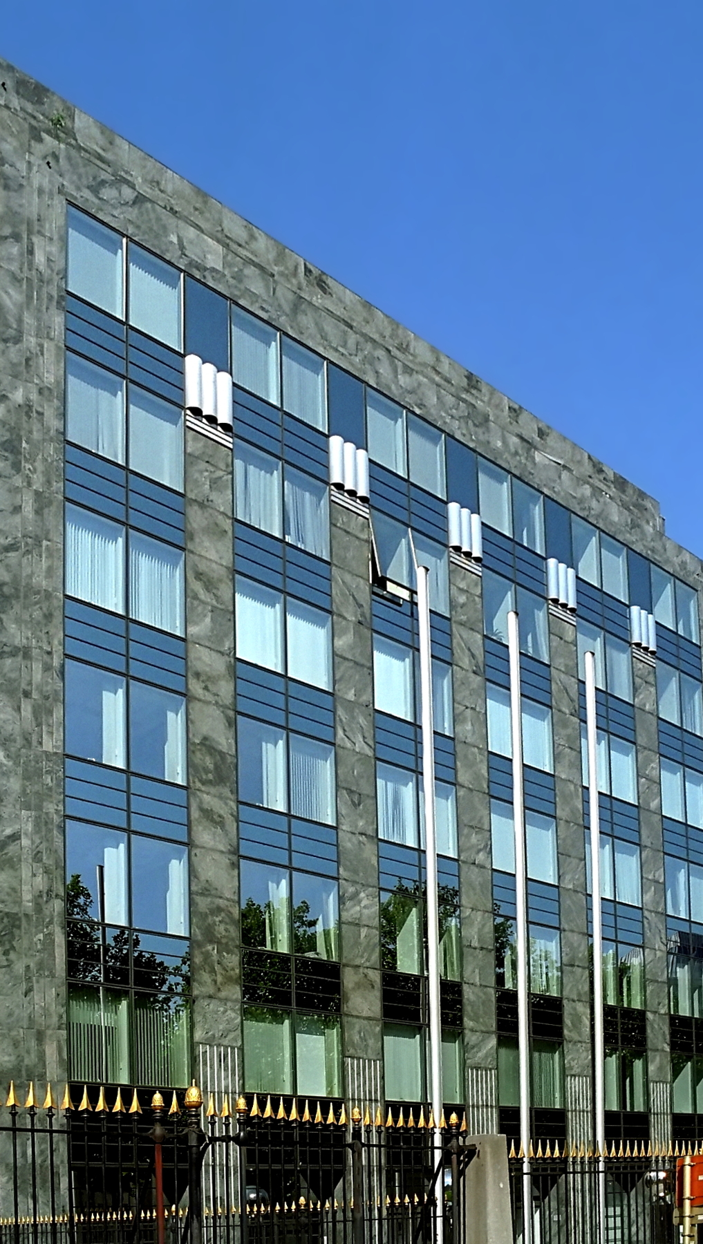 Belgique - Bruxelles - Immeuble Régent 44 (Architecture postmoderne en Belgique - Bureau d'architecture Henri Montois)